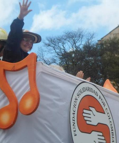 Nydia Quintero de Balcazar, fundadora de Solidaridad por Colombia, encabezando el desfile de la caminata, 26 de agosto de 2012